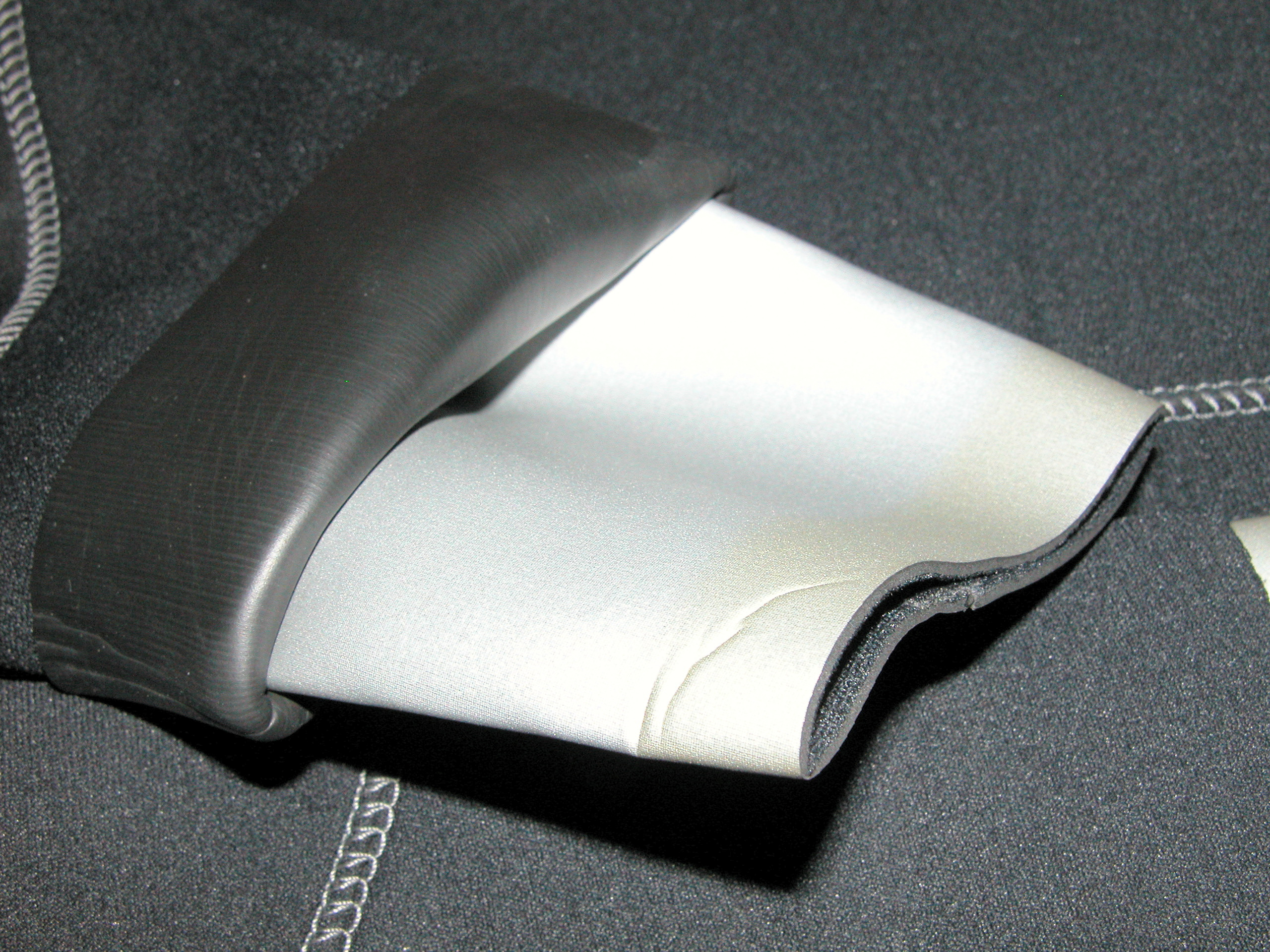 wetsuit, particular